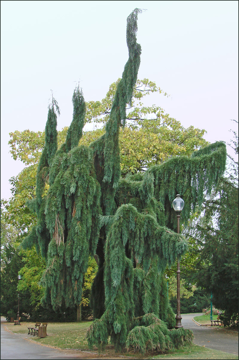 Sequoiadendron gigenteum 'Pendulum' Séquoia pleureur Taxodiacées Parc Sainte-Marie à Nancy